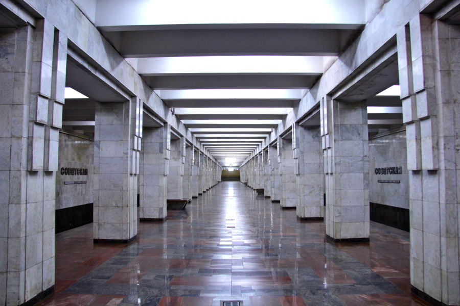 Samara Metro (Самарский метрополитен)